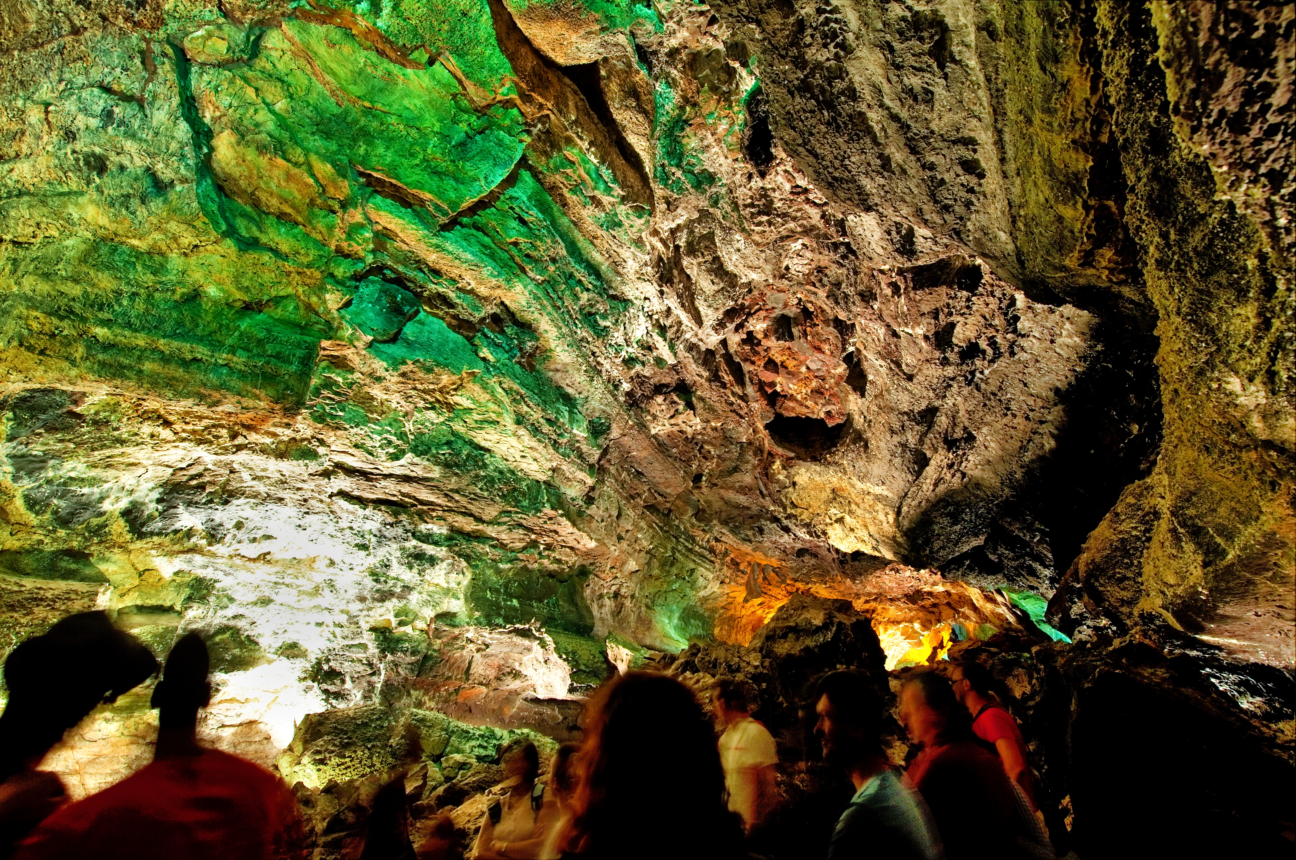 Cueva de los Verdes image miroir sur l'eau Lanzarote îles Cannaries (Espagne)